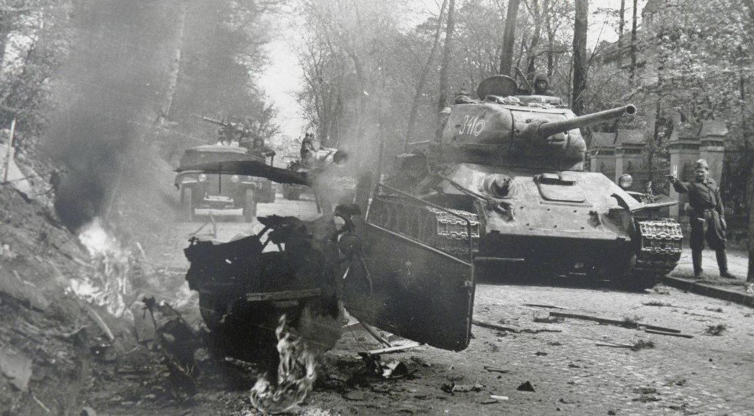 Carri armati sovietici si aprono la strada per Berlino